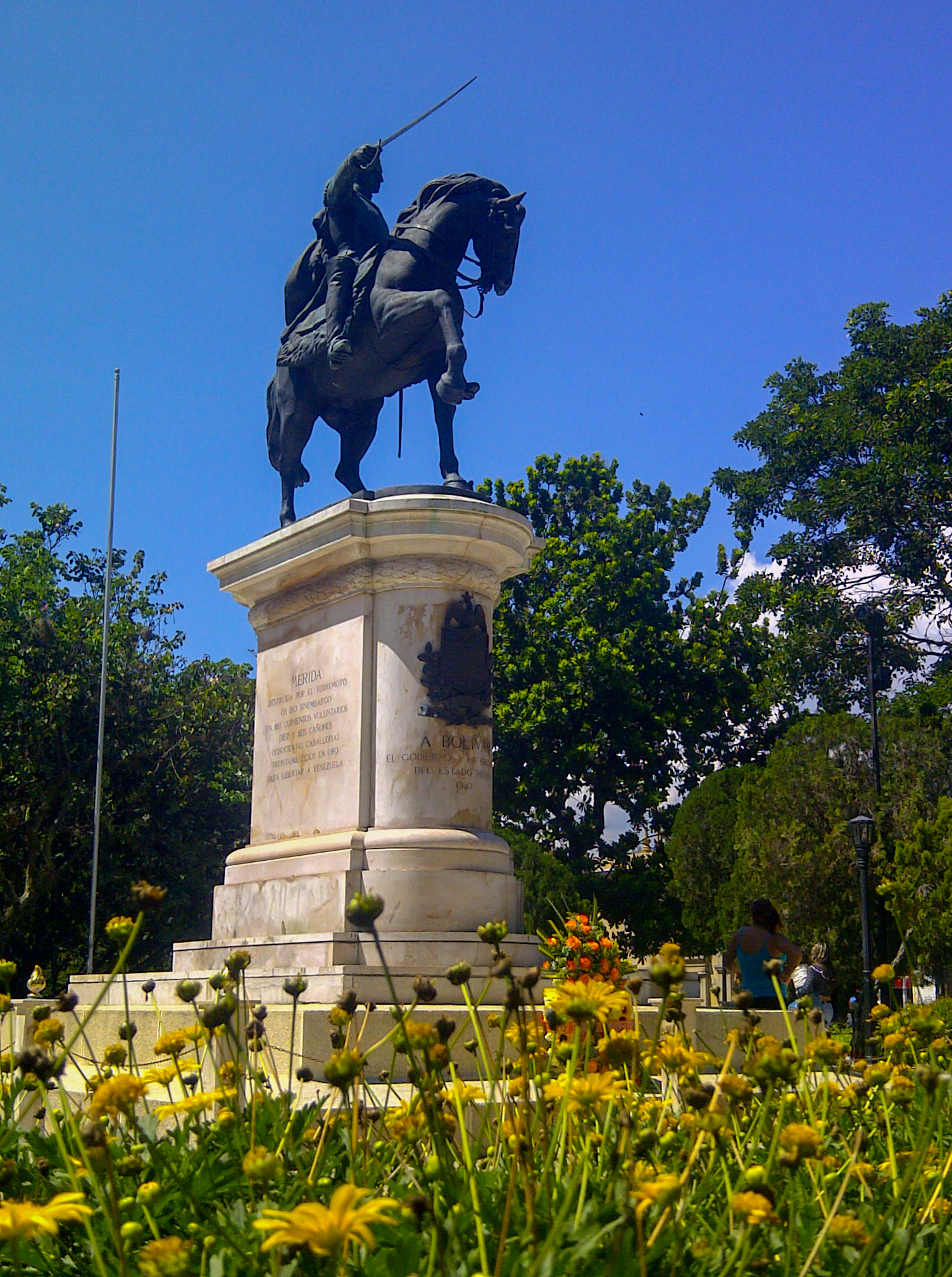 Plaza Bolivar de Merida, Merida, Estado Merida